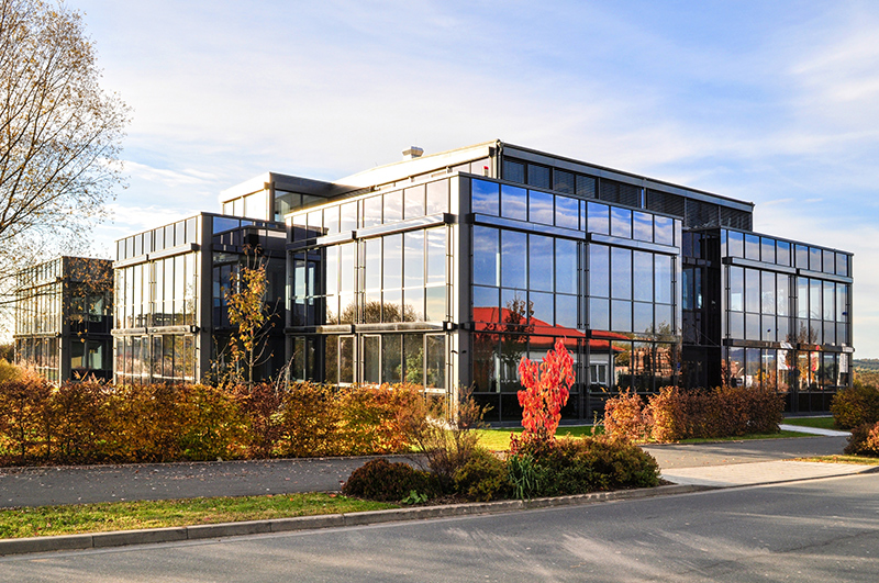 Gebäude Omninet GmbH Dr.-Otto-Leich-Str. 3, 90542 Eckental